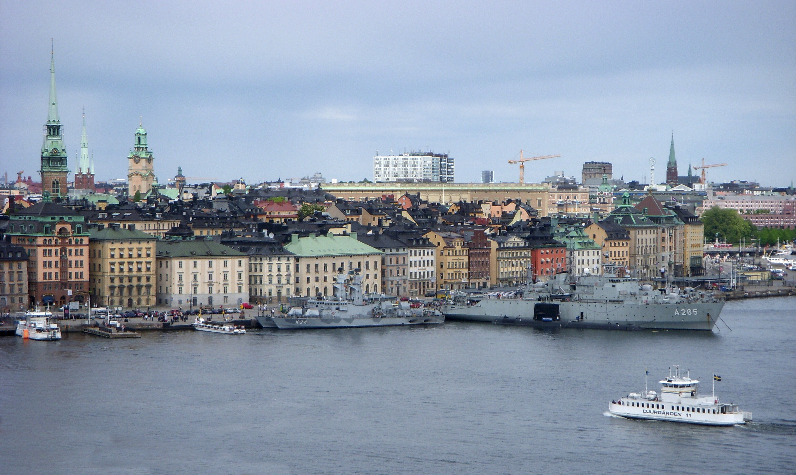 Gamls stan, Skeppsbron och svenska fottan på besök